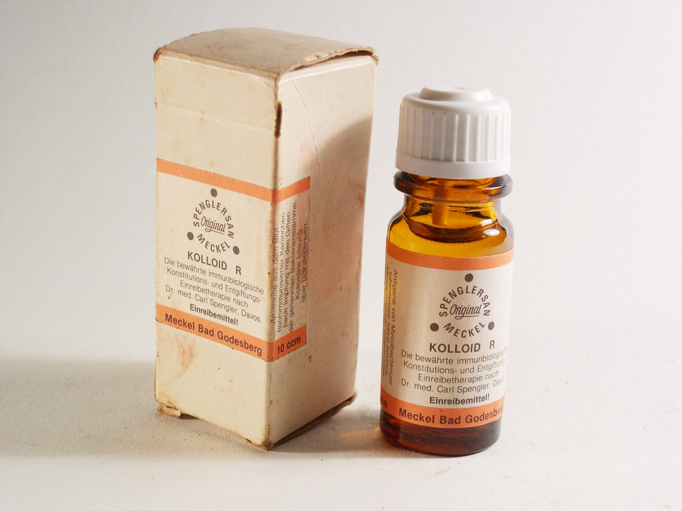 Einreibemittel ! Meckelbad Godesberg